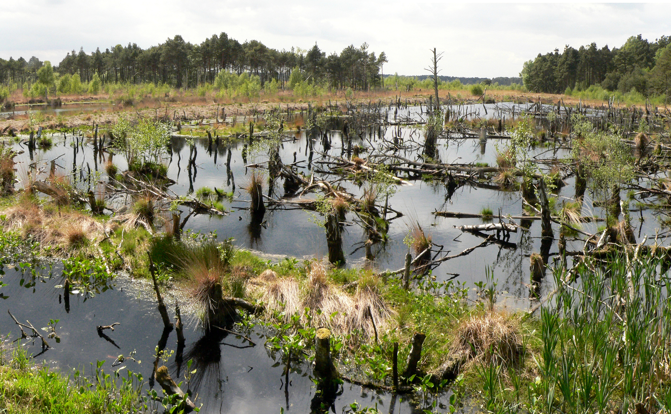 Offene Wasserfläche im Rehburger Moor, Naturschutzgebiet „Rehburger Moore“